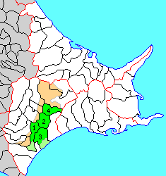 北海道中川郡（十勝国）の位置。